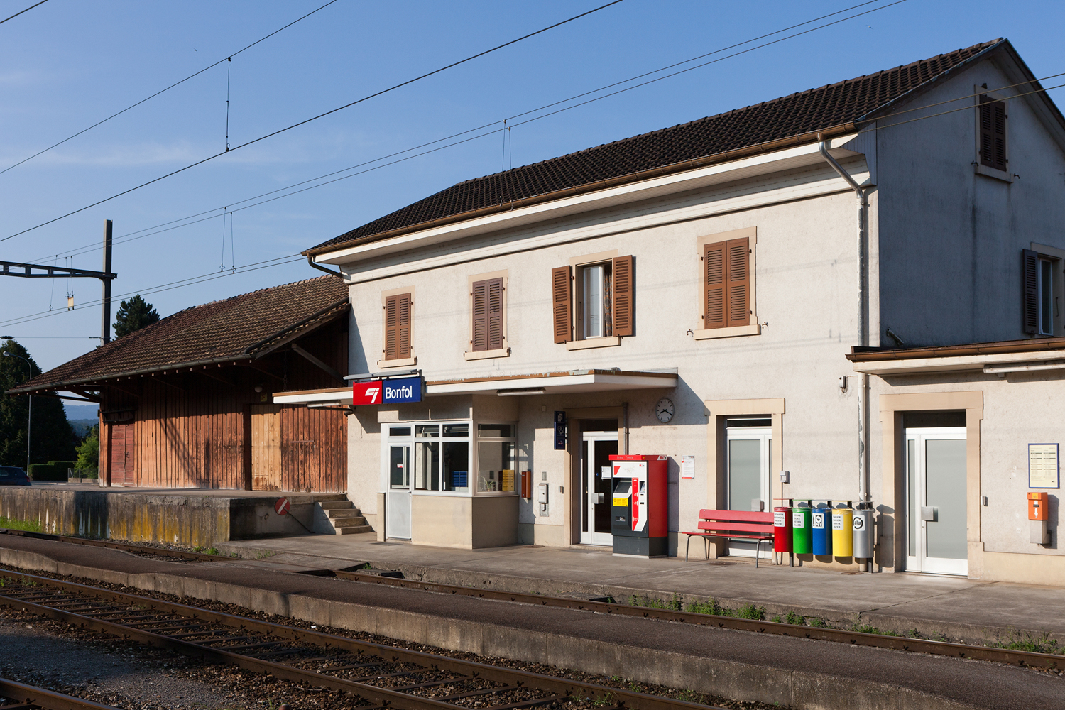 La gare (Chemins de fer du Jura) de Bonfol (Jura)